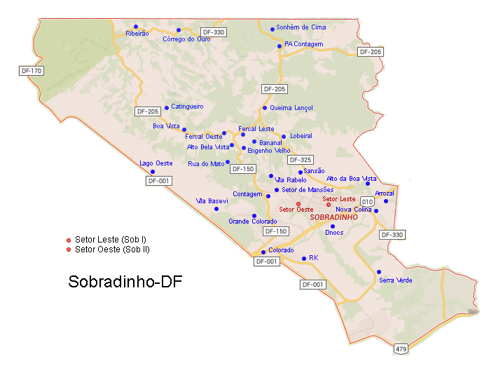 Português do Brasil: Mapa completo de Sobradinho-DF